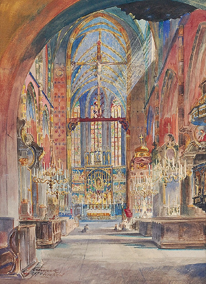 Franciszek Turek Wnętrze Kościoła Mariackiego w Krakowie 1921